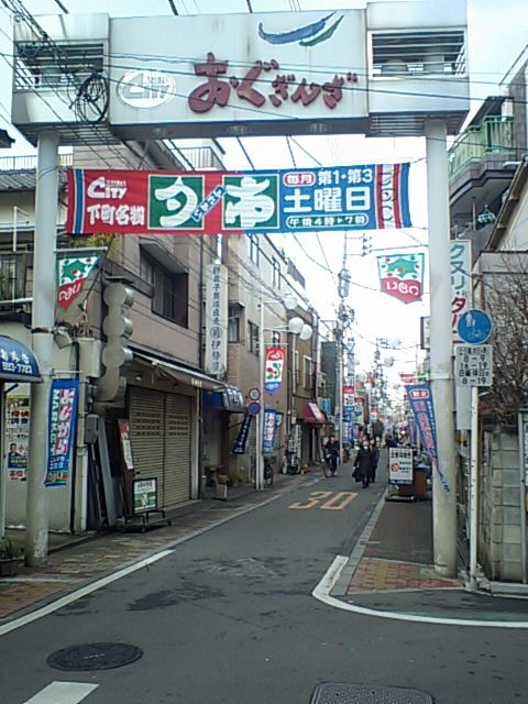 尾久銀座商店街（東京都荒川区東尾久4丁目）